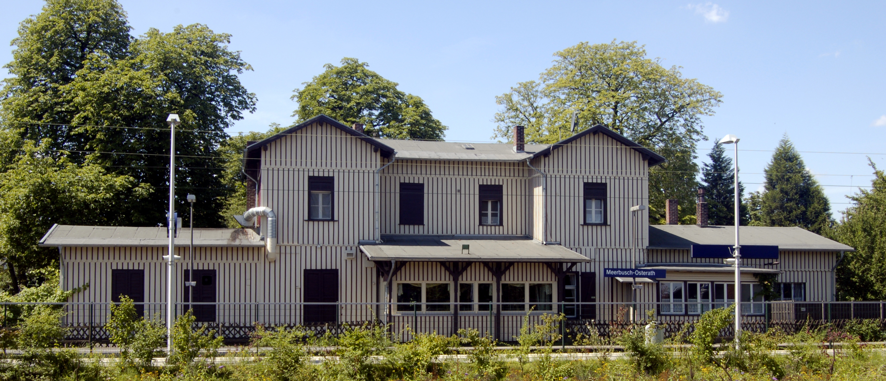 Bahnhof Meerbusch Osterath, Ansicht von Gleisseite